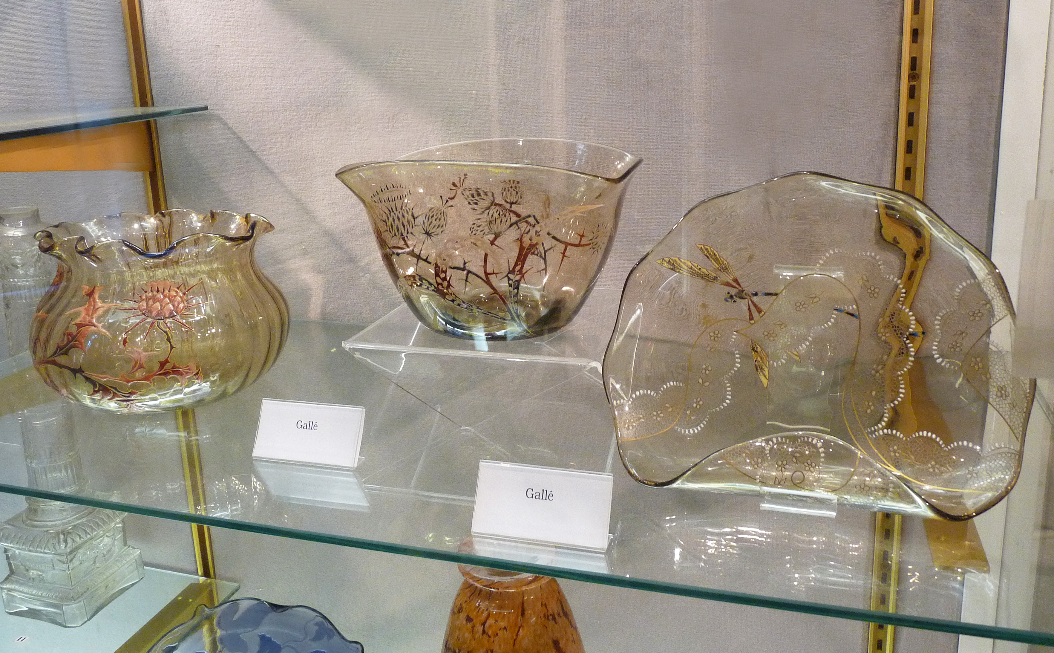 Verreries d'Emile Gallé au Musée Charles de Bruyères (Remiremont)